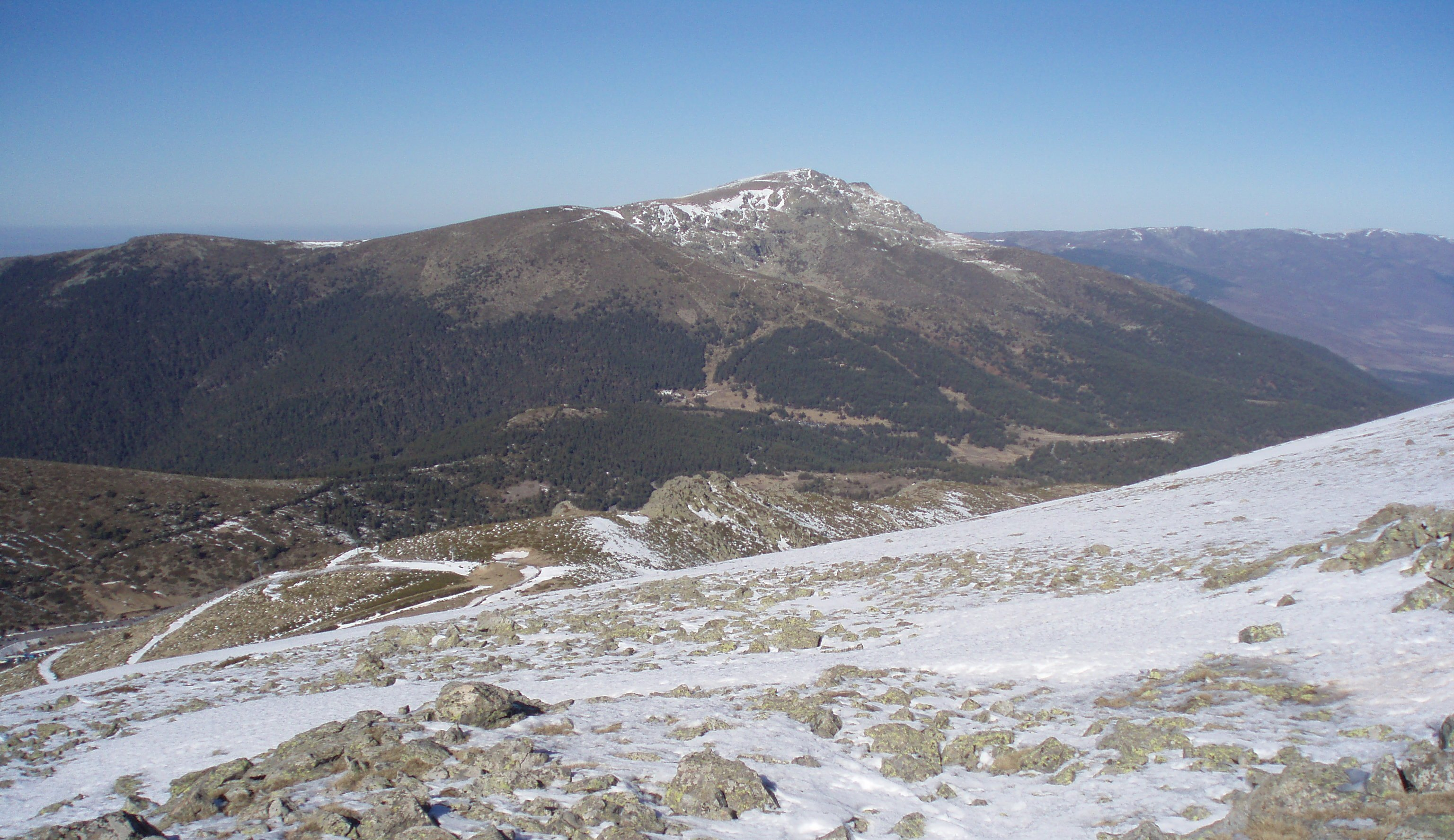 Vertiente sur del macizo de Peñalara vista desde la cima del Cerro de Valdemartín (Sierra de Guadarrama, España).